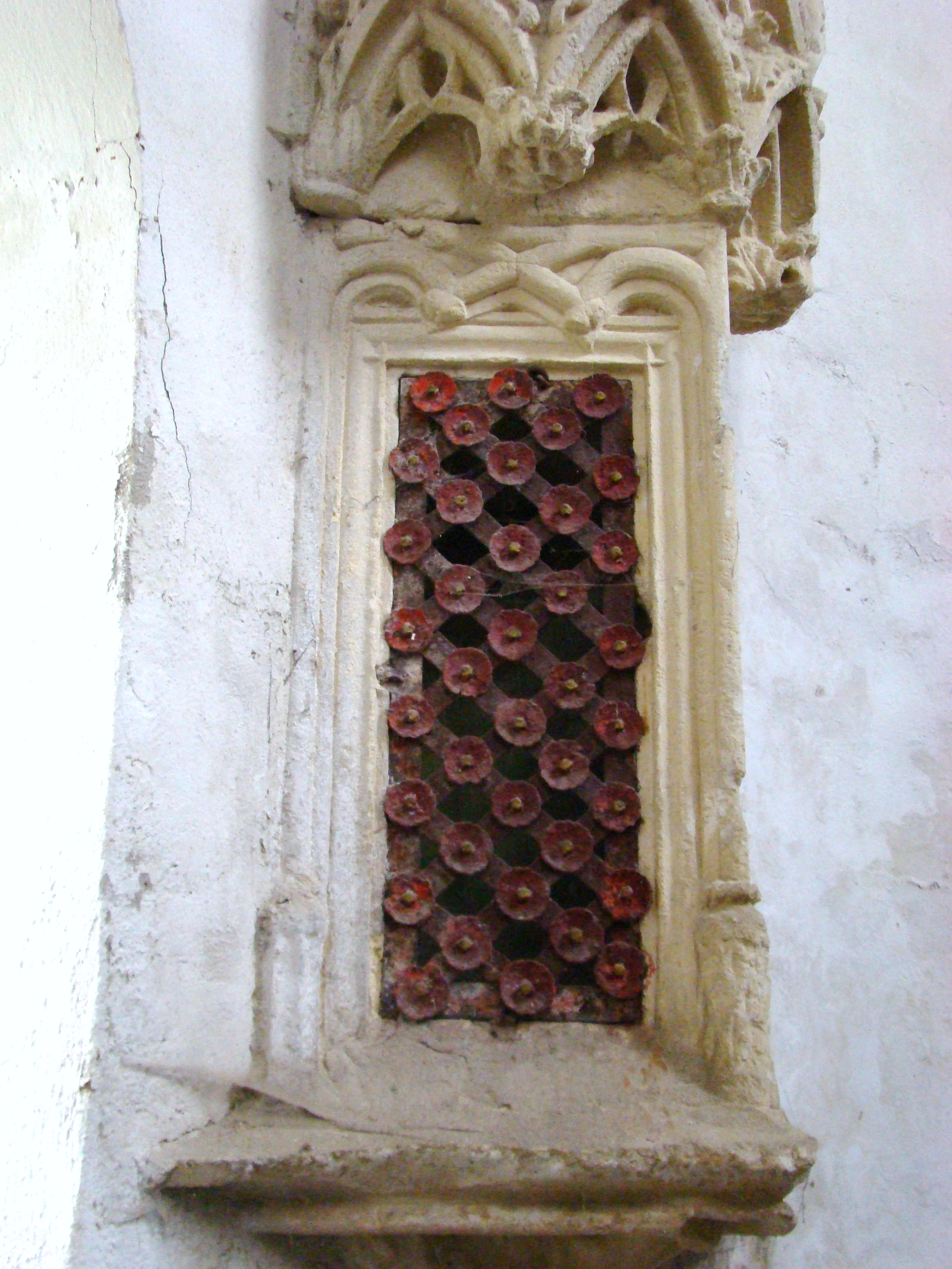 Biserica evanghelică fortificată, sat TÂRNAVA; comuna TÂRNAVA, județul Sibiu 01